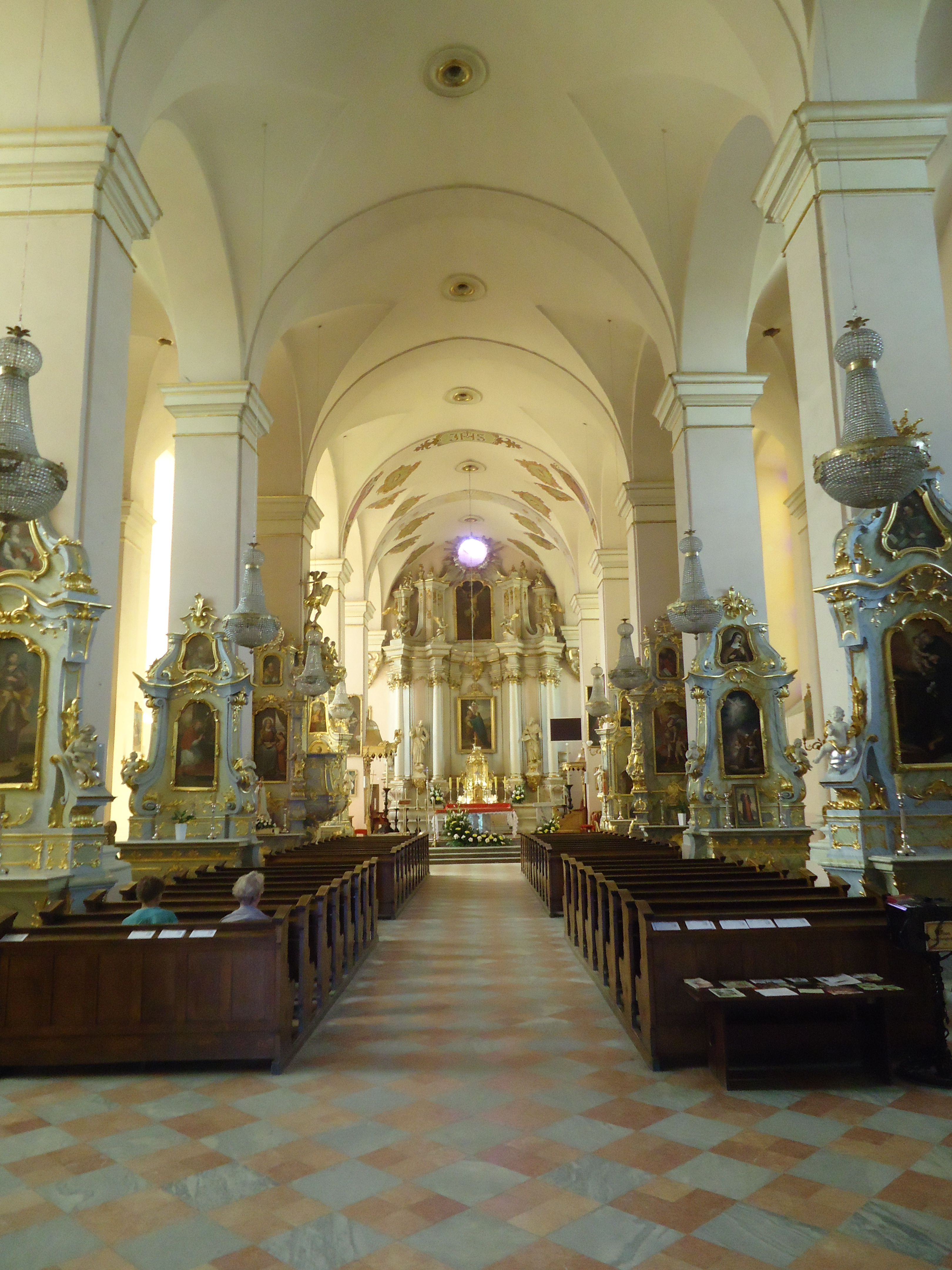 Sejny, Bazylika Nawiedzenia Najświętszej Maryi Panny w Sejnach Wikidata has entry Q9167724 with data related to this item.